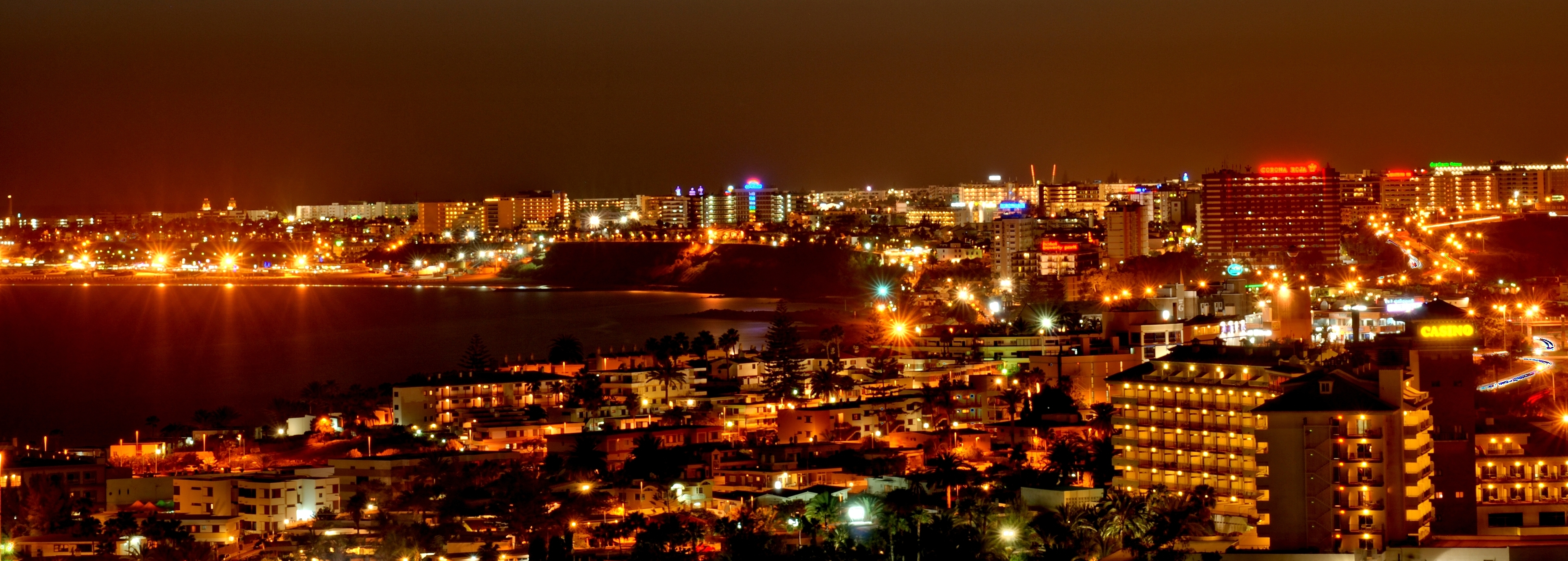 Der Strand von Playa del Ingles mit El Ingles & San Agustin von Aguila aus (DRI)